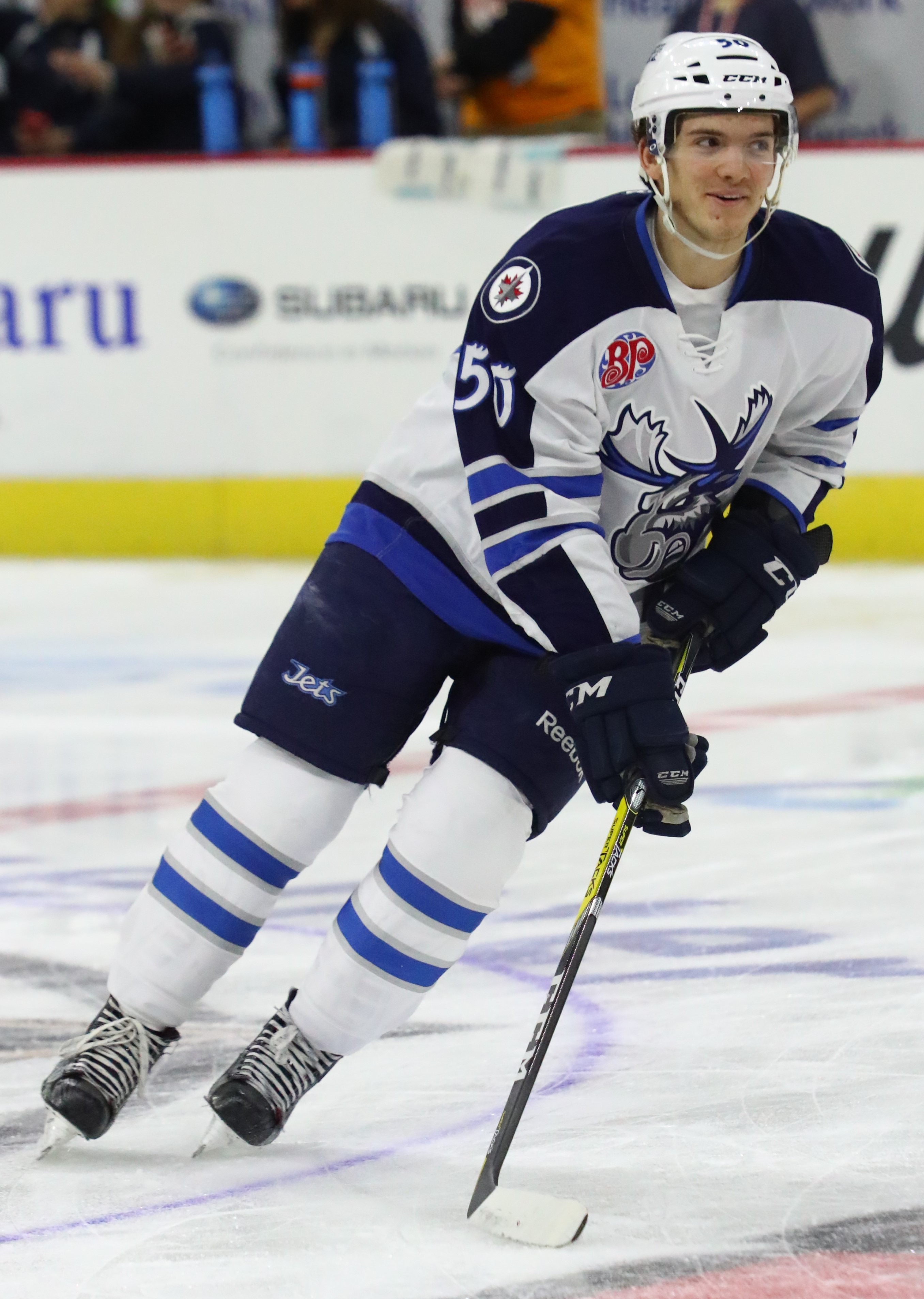 BZ3I5871